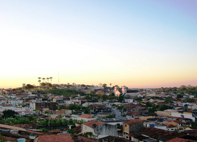 Vista de Lagoa Seca em crepúsculo